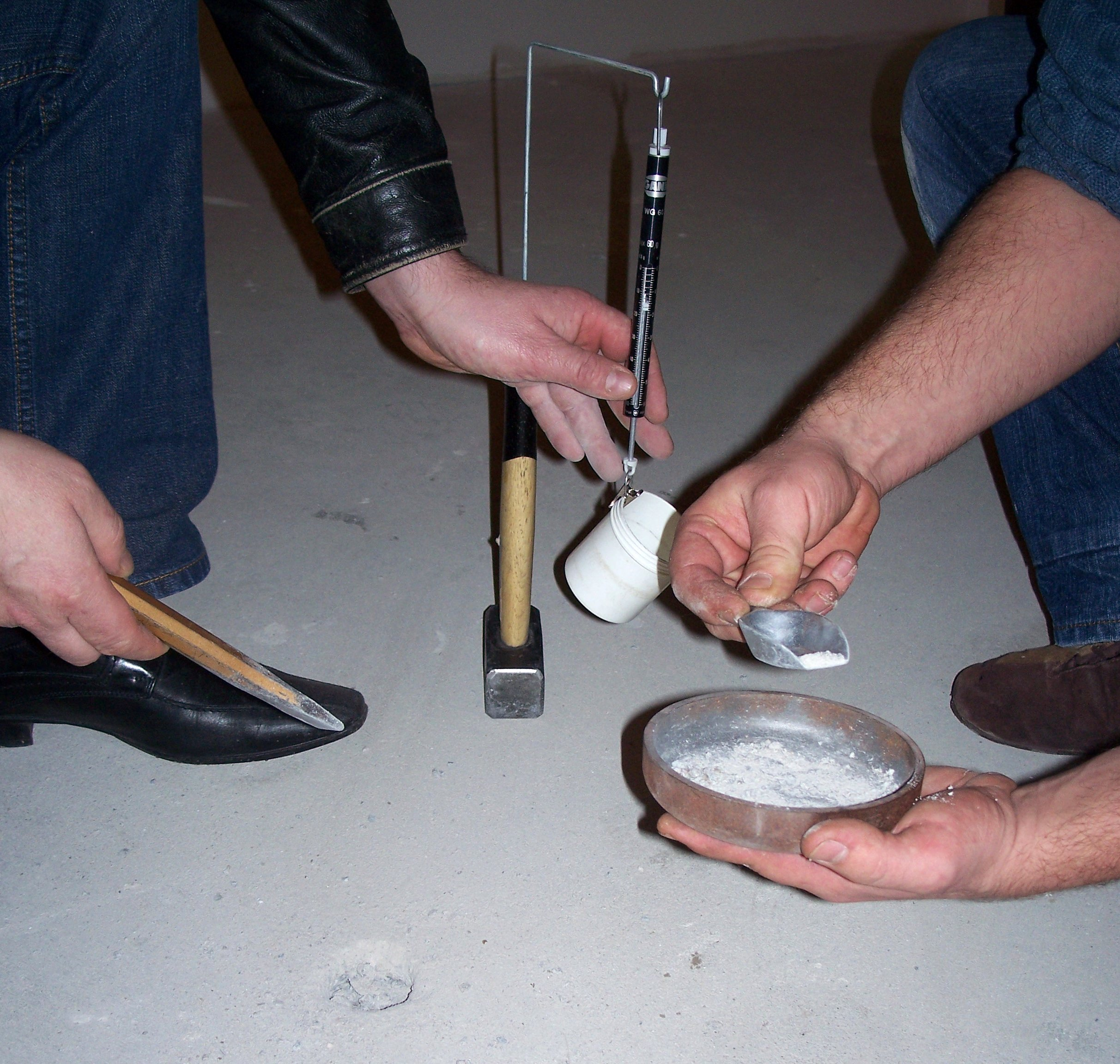 Probenentnahme und -zubereitung Feuchtemessung nach der Calciumcarbid-Methode für Estrich